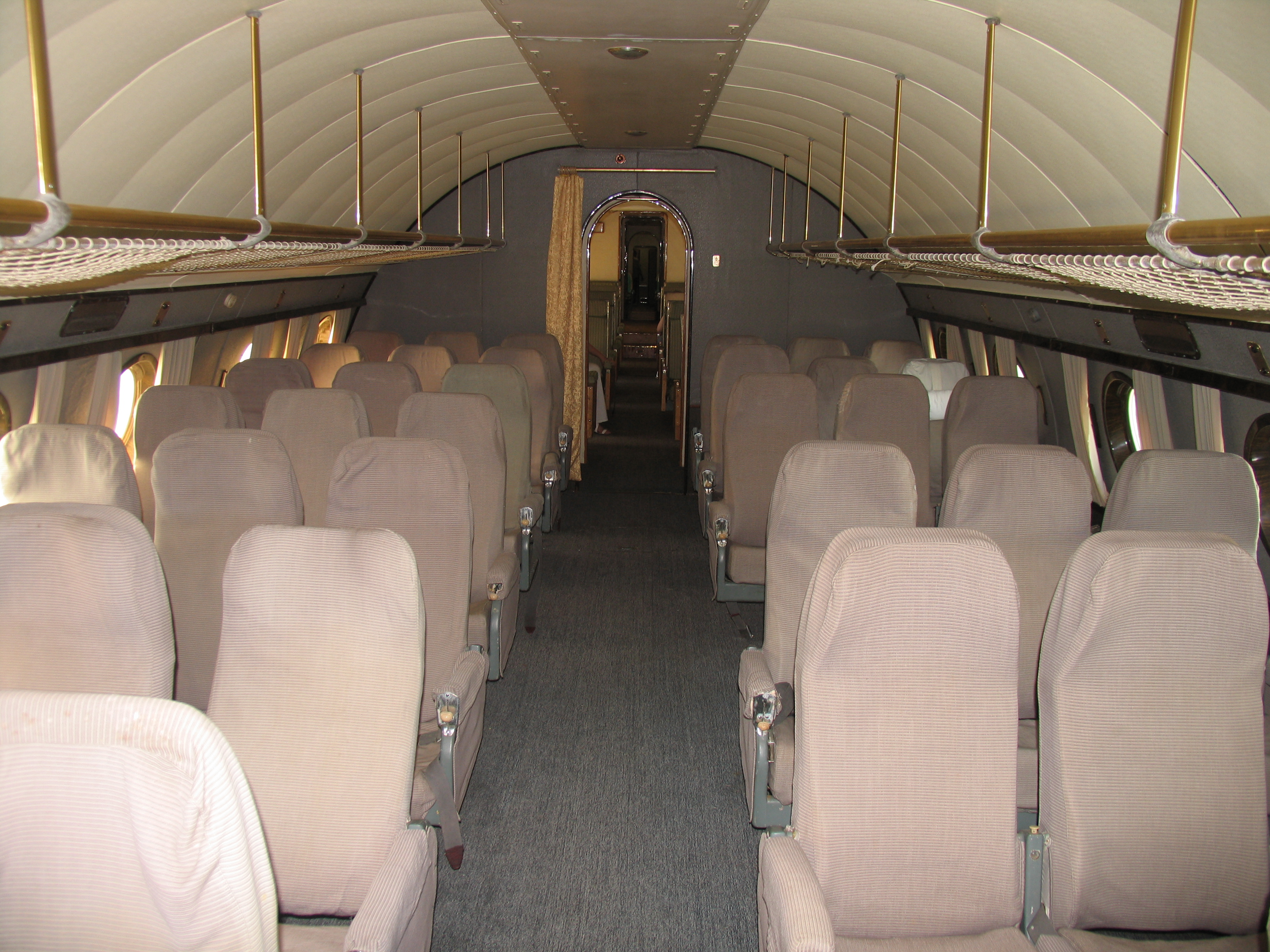 Пассажирский салон авиалайнера Ту-114.